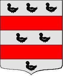 Regnauld porte d'argent à deux fasces de gueules, accompagné de 6 merlettes de sables posées sur l'argent 3, 2 et 1